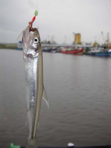 Osmerus eperlanus Stint an der Angel Quelle und Veröffentlichungs-Einverständnis von "Pruss, Thomas" eingestellt von -- WHell 08:16, 23. Nov 2005 (CET)